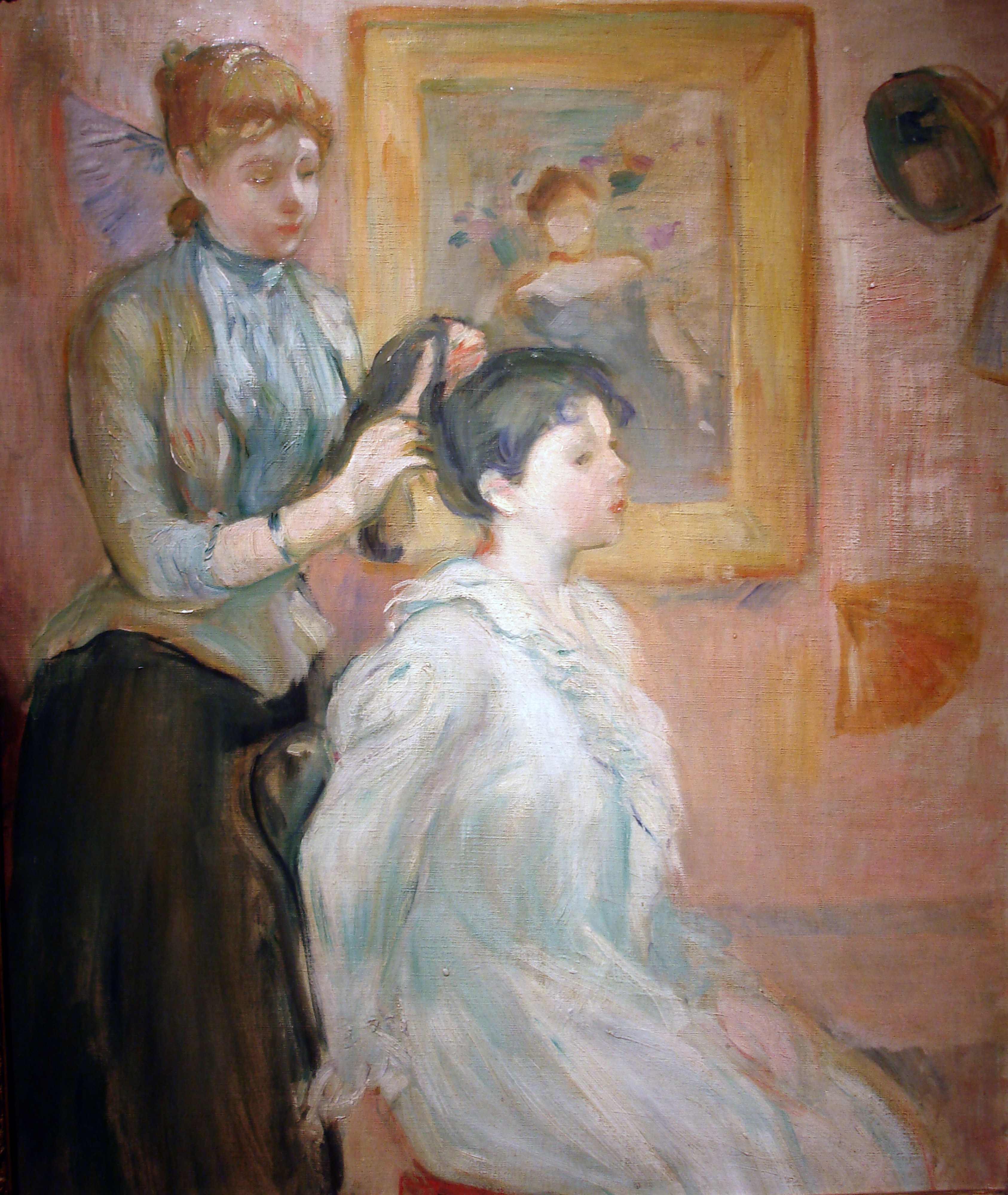 Berthe Morisot, La Coiffure (El peinado). 1894. 55 x 46 cm, óleo sobre tela. Inv. 7408.